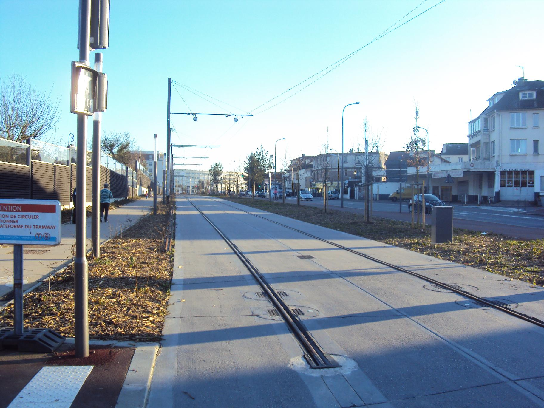 Travaux du T6 Vélizy